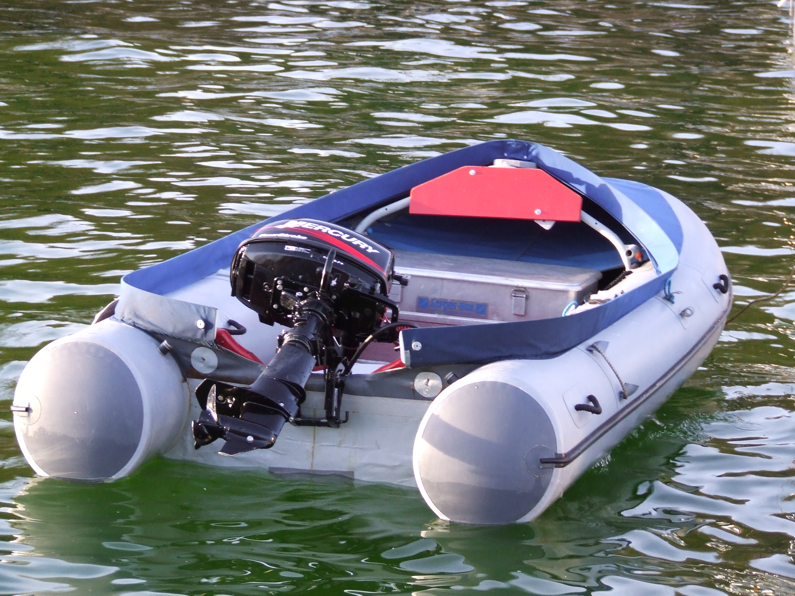 Wiking Komet 340 Mercury